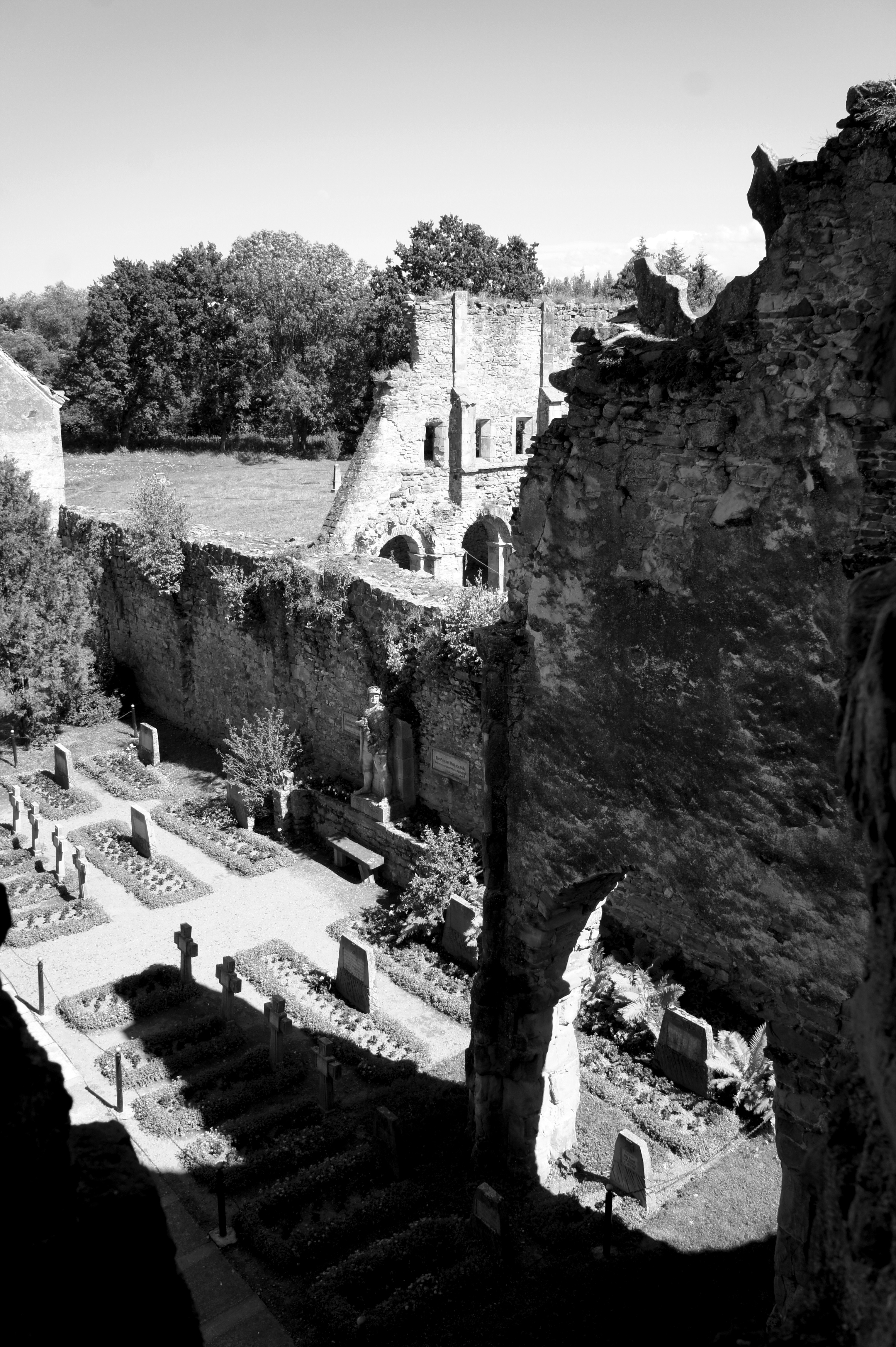 vue de la nef